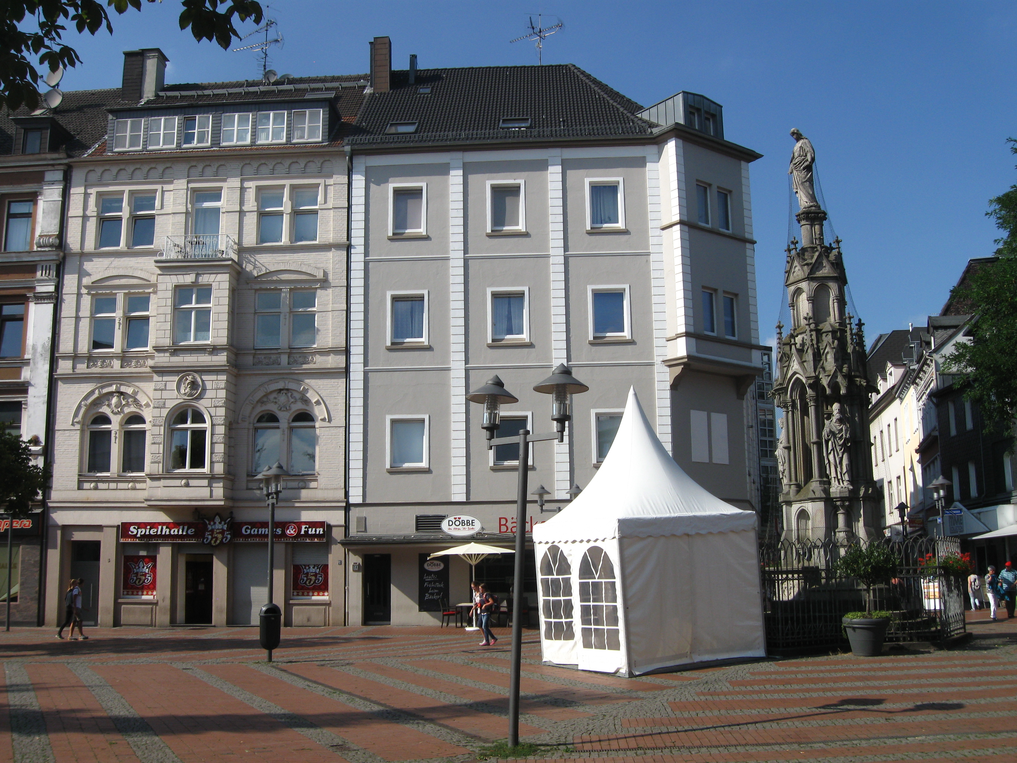 Grendplatz in Essen-Steele, Blick vom Eingangsbereich des Amtsgerichts, an der Mariensäule ein weißes Info-Zelt.